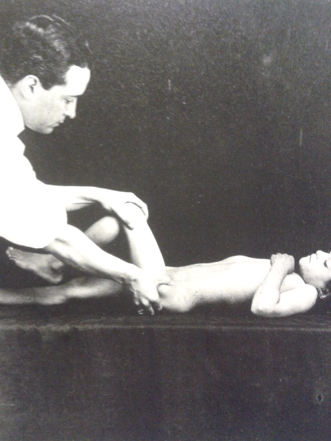 Putti che esamina un caso di dislocazione congenita dell'anca, Cioni-Bertoli Barsotti, The Rizzoli Orthopaedic Institute in San Michele in Bosco, Istituti Ortopedici Rizzoli, 1996, 287 pagine, p. 130